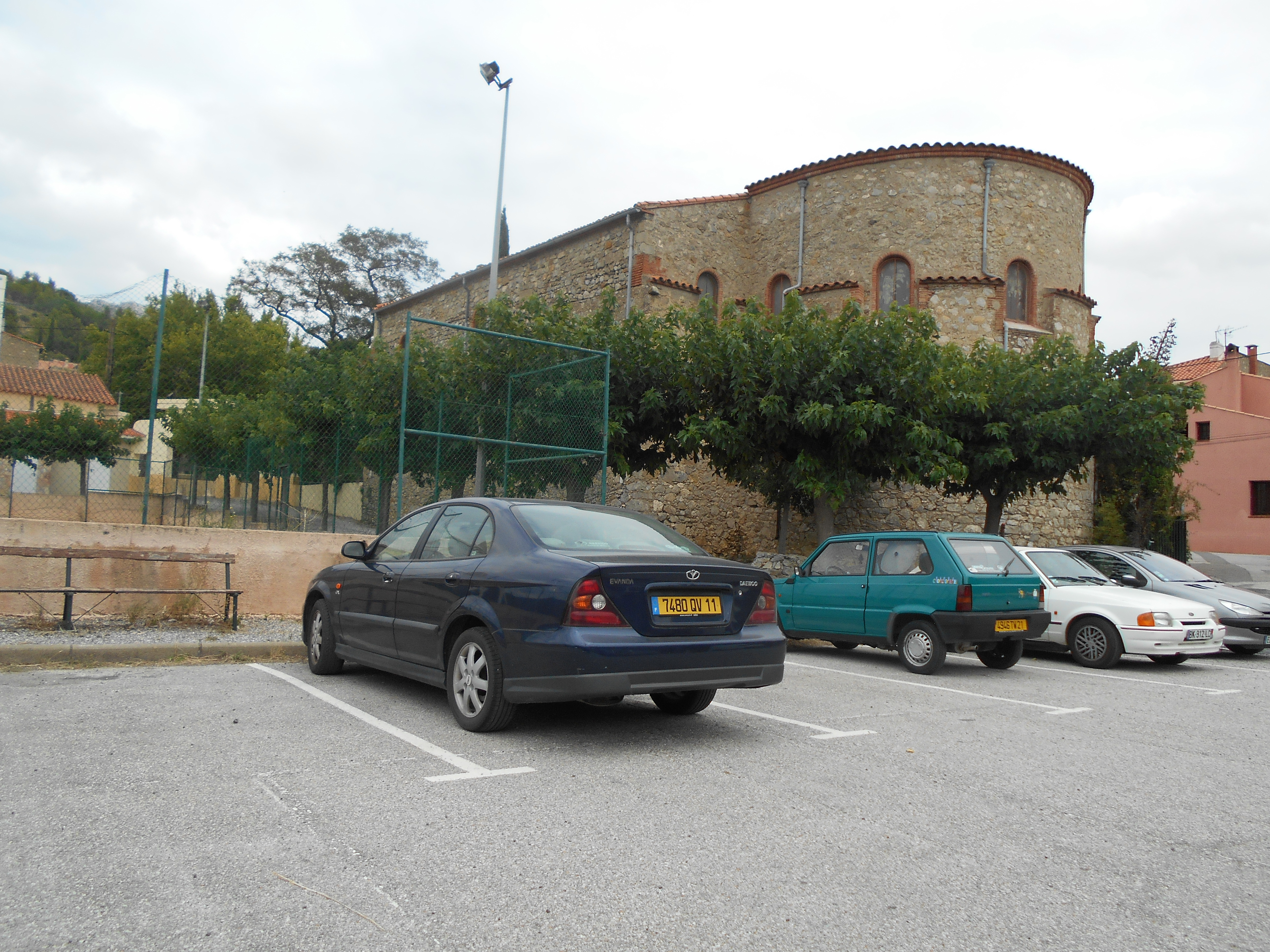 Absis i paret lateral nord de la Mare de Déu de Fontfreda, a Vingrau.